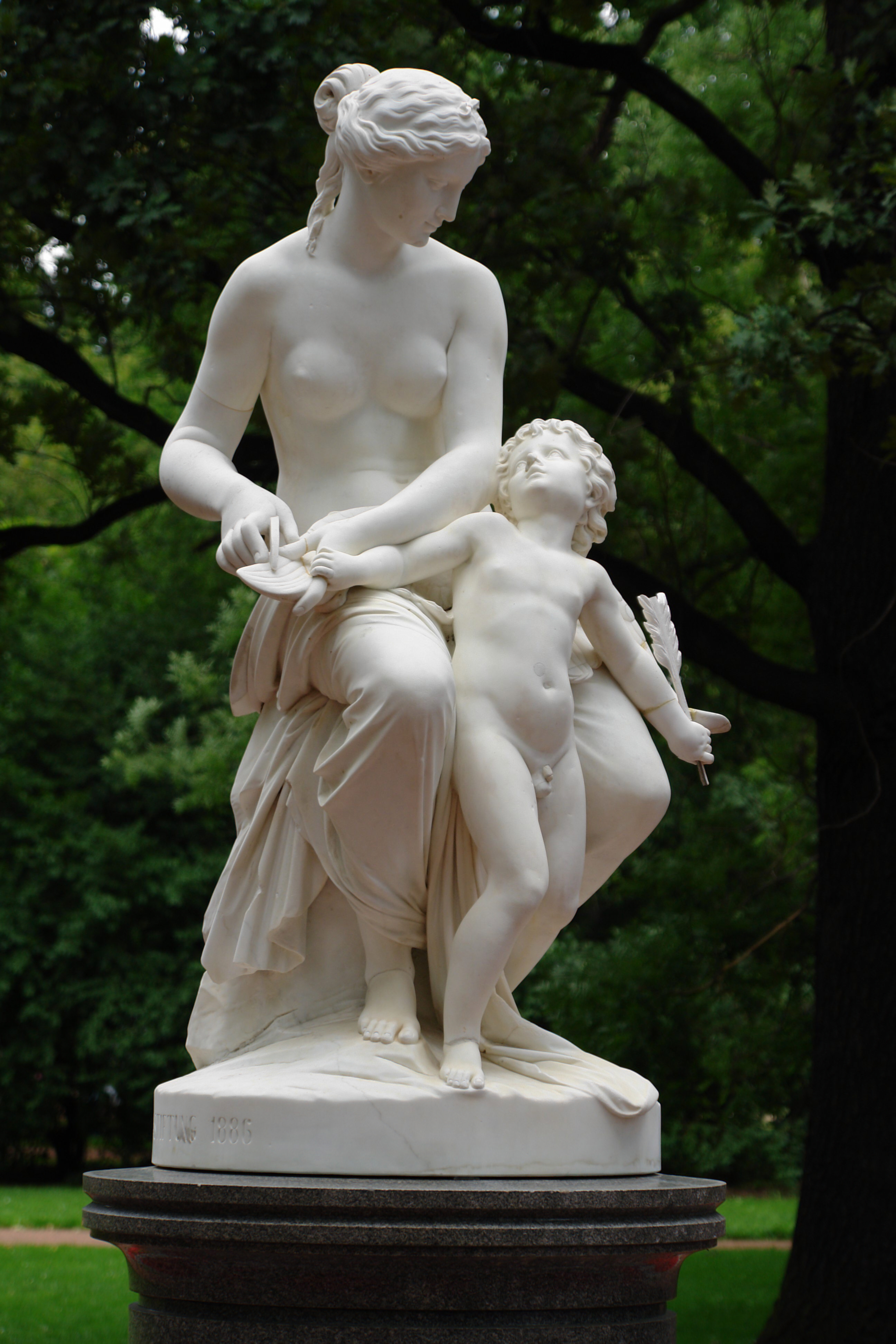 "Venus, Amor die Flügel beschneidend" von Theodor Heinrich Bäumer, 1886